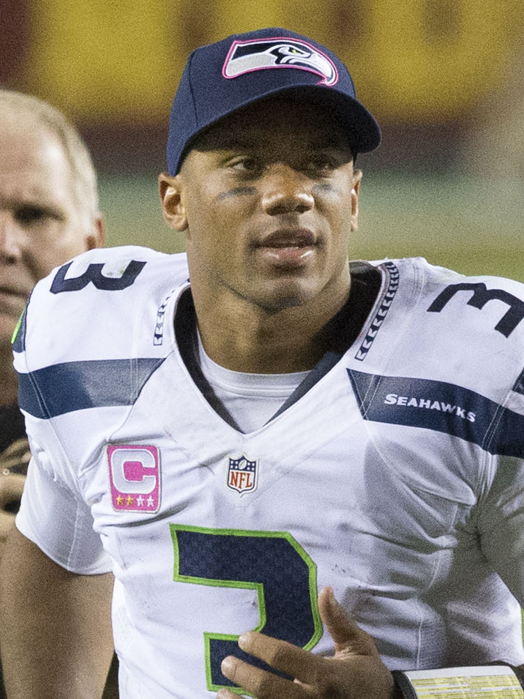 Seahawks at Redskins 10/6/14